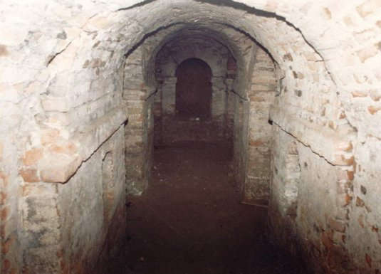 Podziemne katakumby